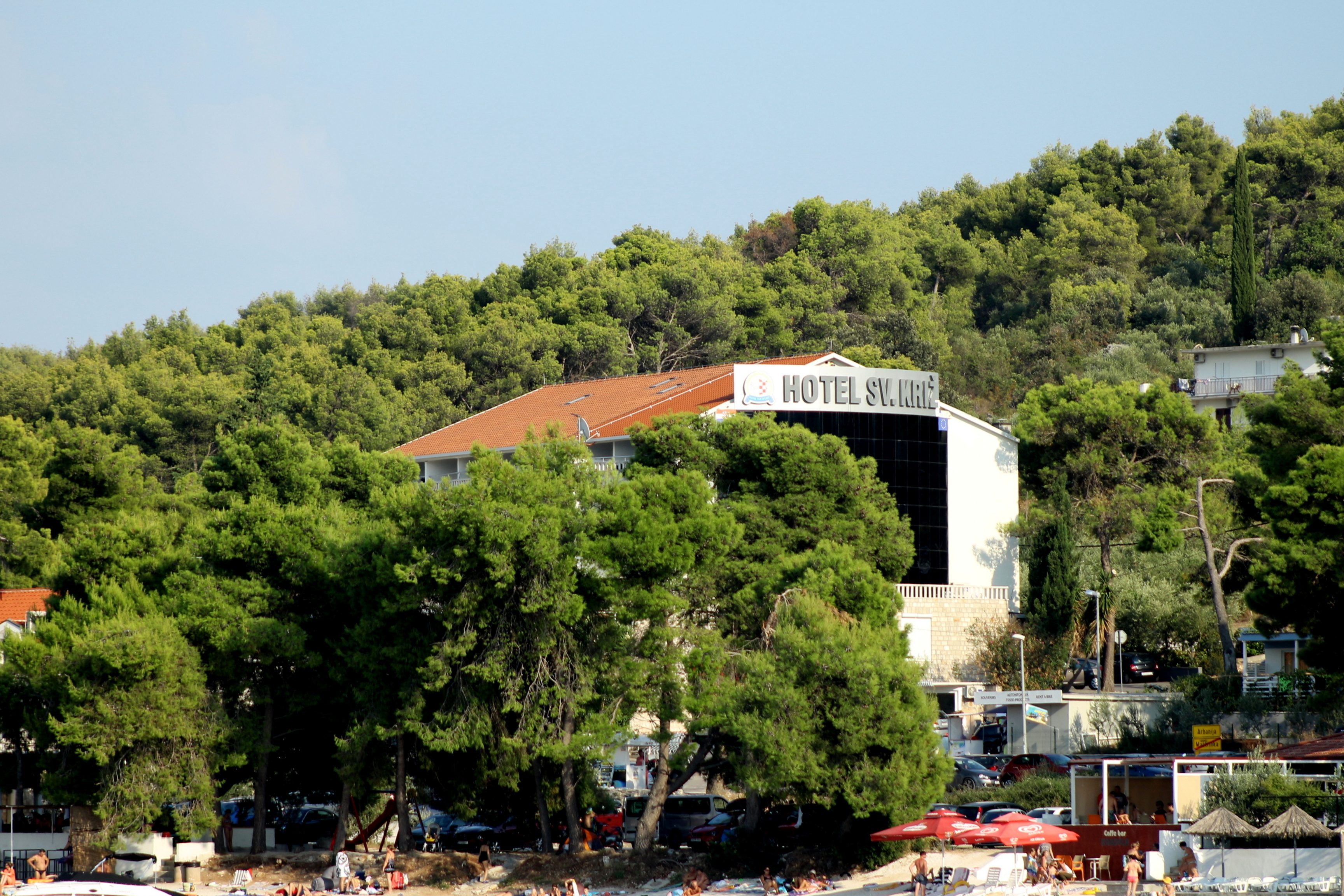 Arbanija, ostrov Čiovo, Chorvatsko